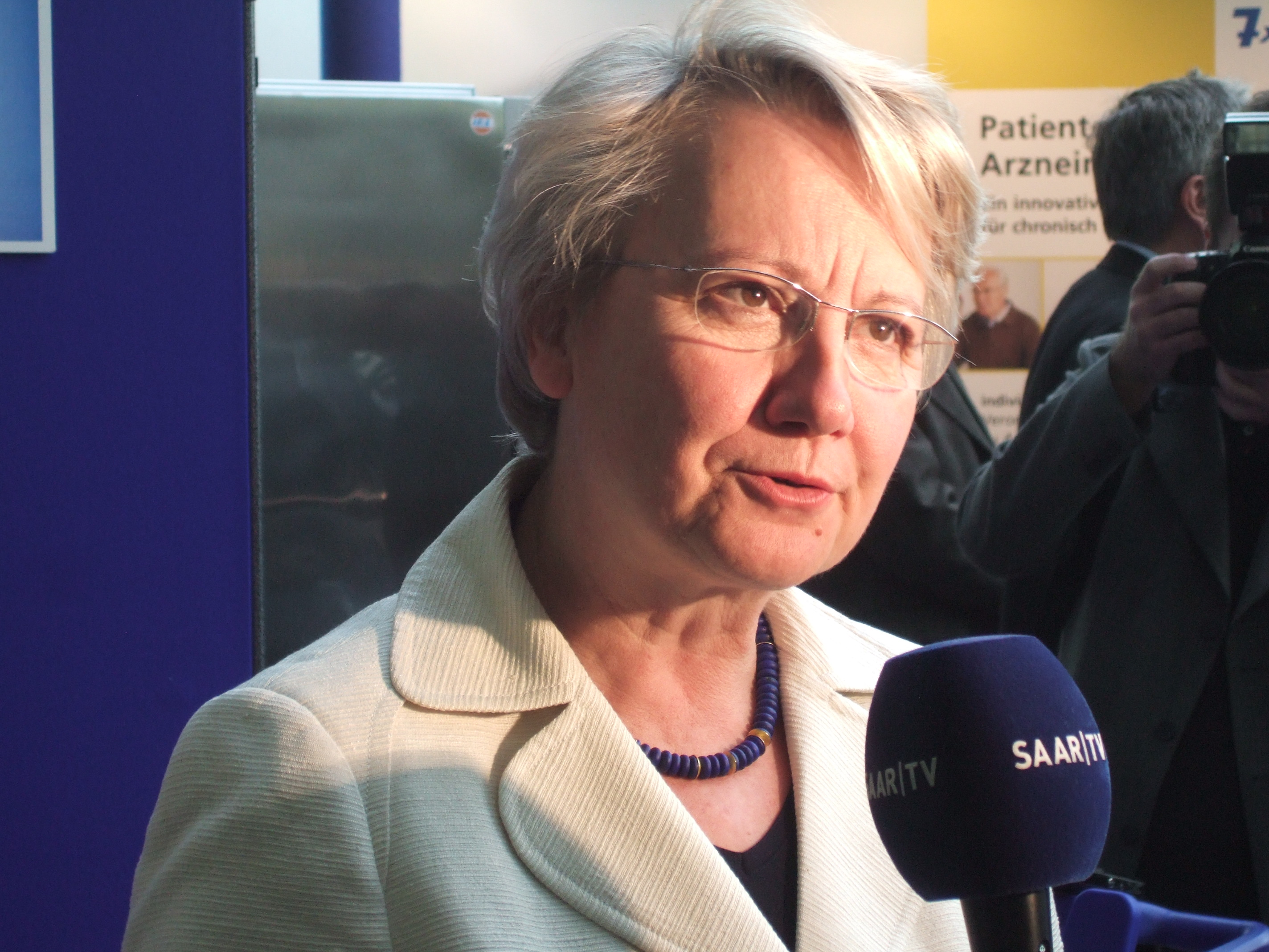 Bundesministerin Annette Schavan am DFKI 2008